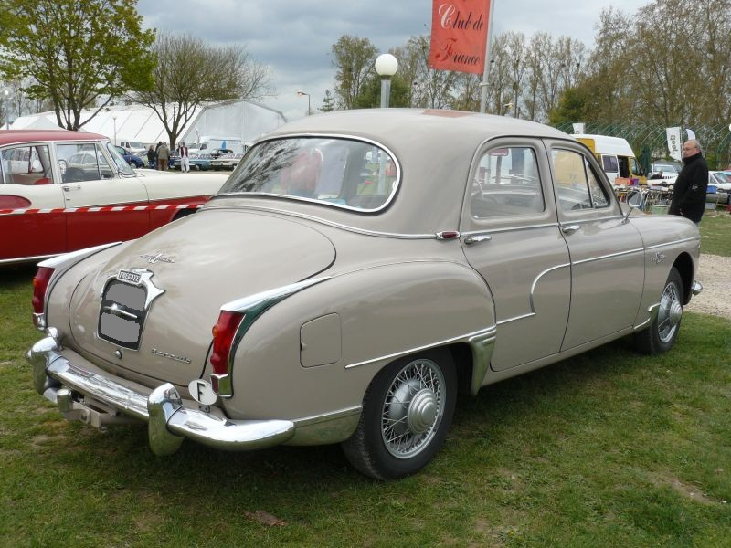 Mantes la Jolie 2012